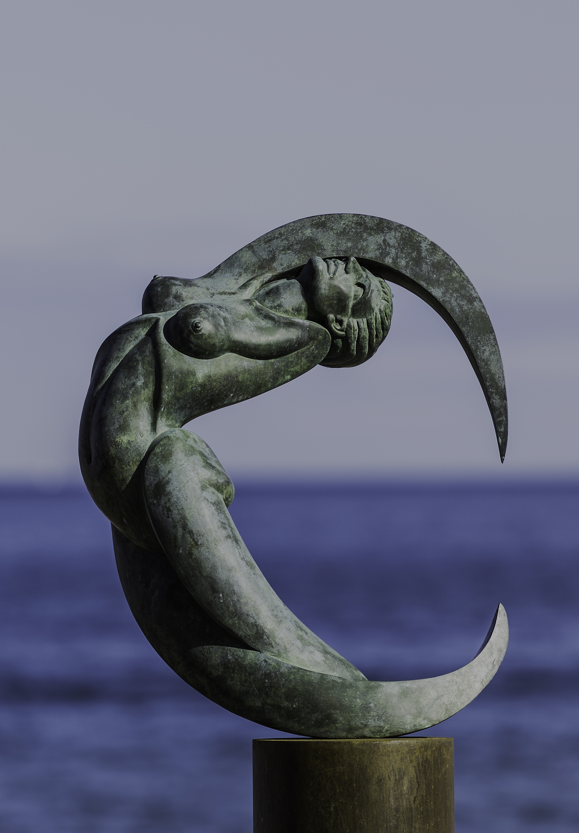 Escultura de Mustafa Arruf. Mujer (2002)),[1]